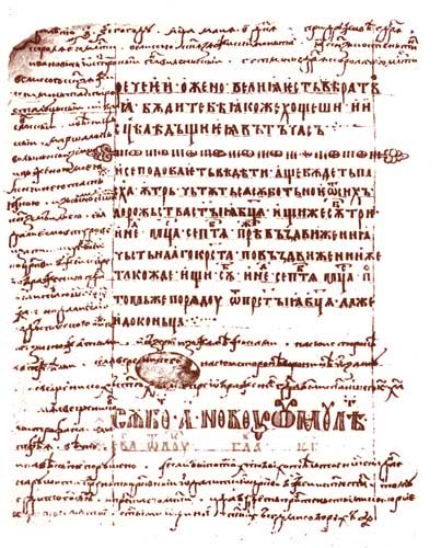 Беларуская (тарашкевіца): Аркуш Тураўскага Эвангельля з дароўным запісам князёў Астроскіх